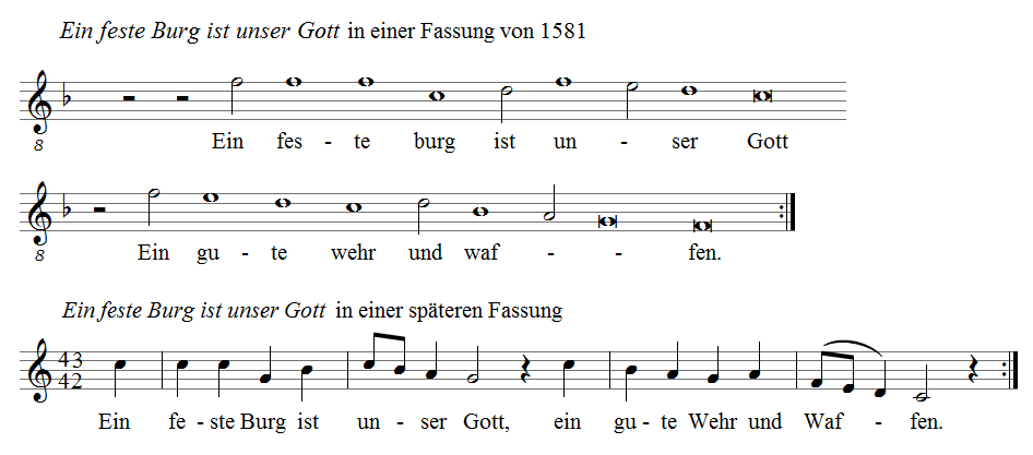 Zwei Versionen von Ein feste Burg ist unser Gott: Andrew Wilson-Dickson: Geistliche Musik – Ihre großen Traditionen – Vom Psalmengesang zum Gospel; Brunnen Verlag, Gießen, 1994; Seite 63 und Neues Choralbuch zum Evangelischen Kirchengesangbuch, Bärenreiter, Kassel und Bael, Ausgabe 440, 1956, Seite 55